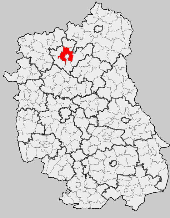 Map of gmina Radzyń Podlaski (rural), Radzyń Podlaski county, Lublin voivodship Mapa gminy Radzyń Podlaski (wiejska), powiat radzyński, województwo lubelskie